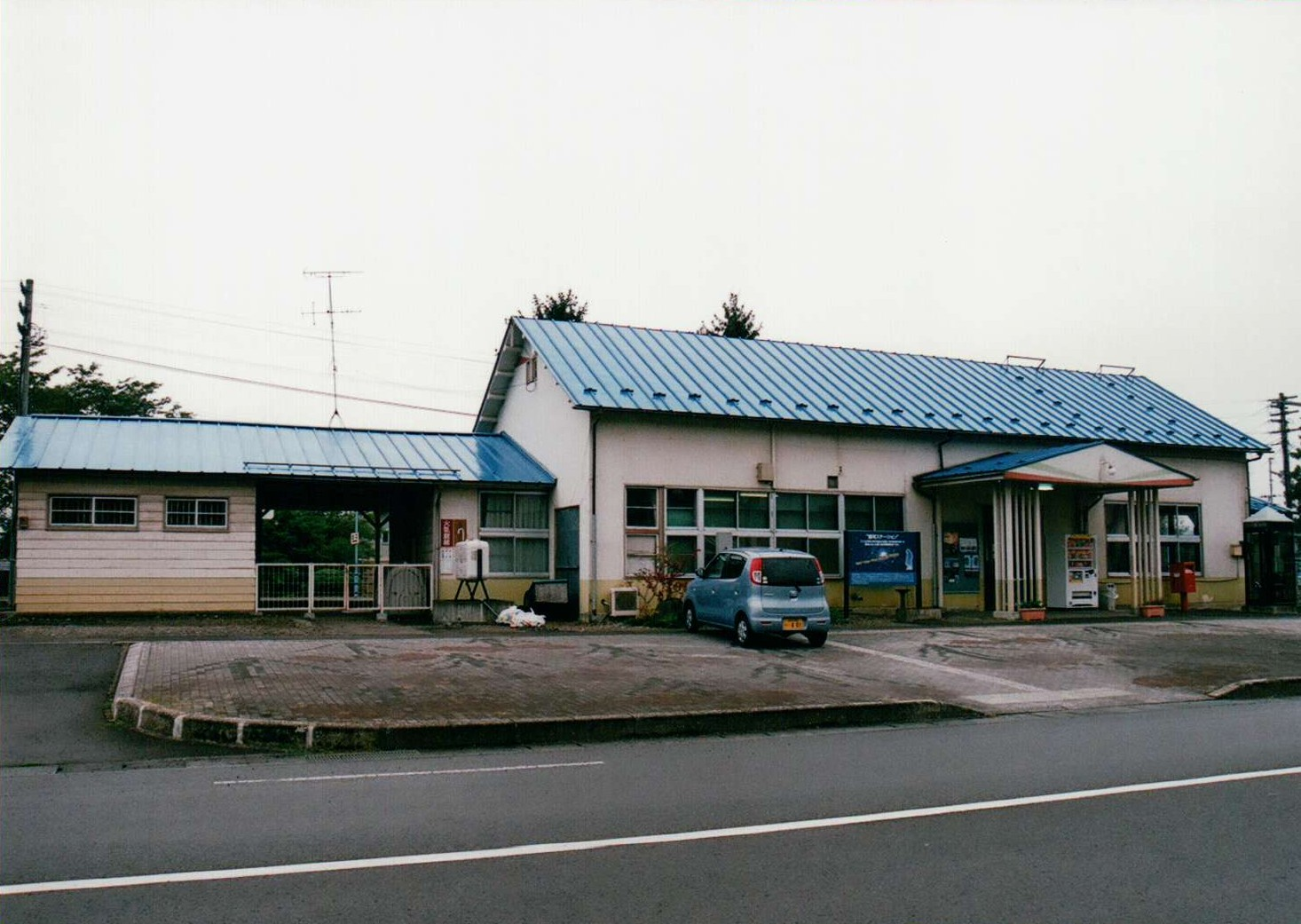 土沢駅(2009/09/22)